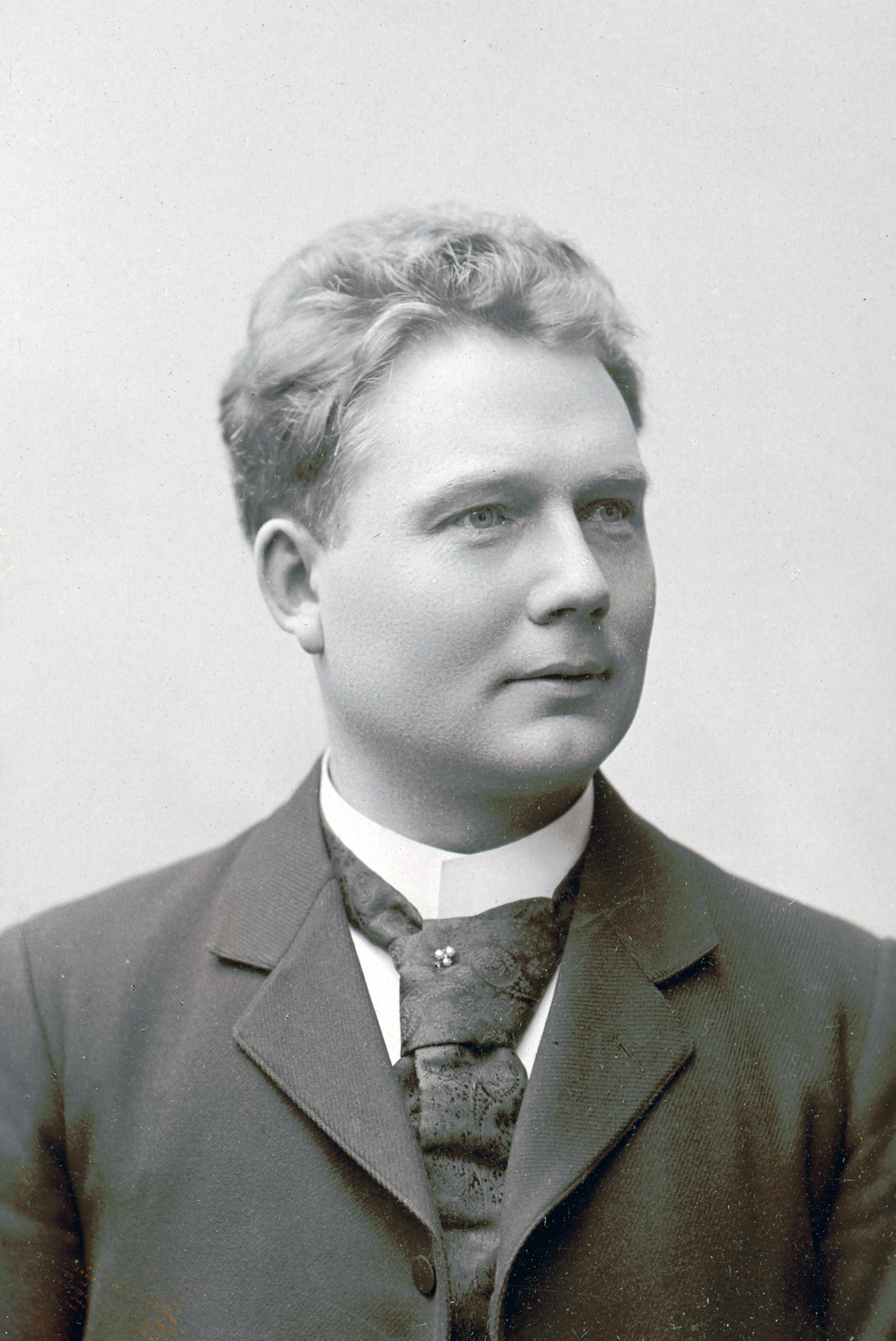 Herman Brag, Kungliga Operan 1895